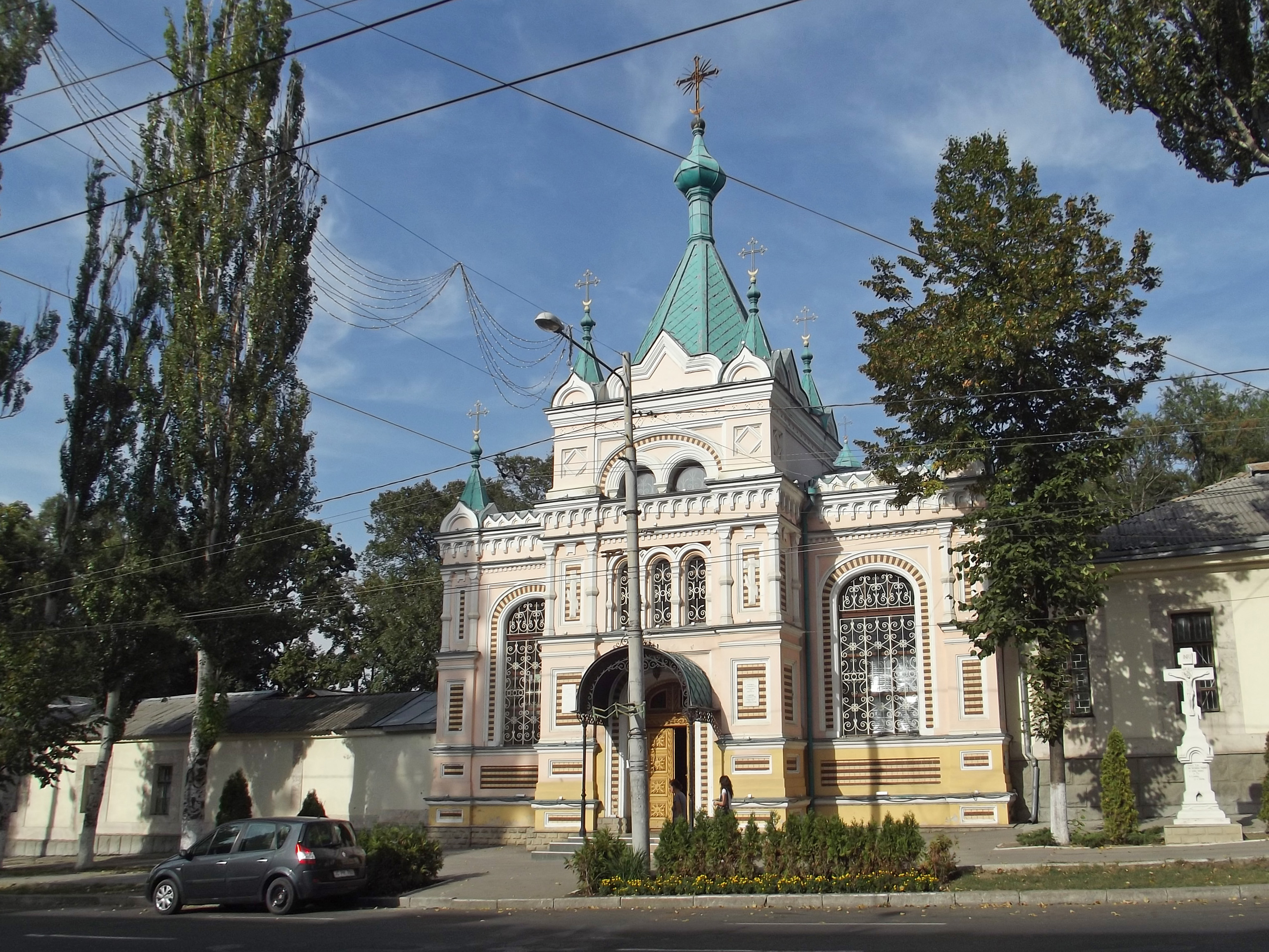 Церковь Св. Николая